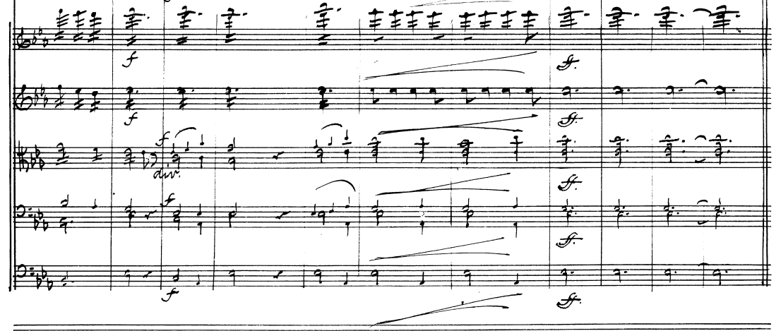 Rękopis partytury IV Symfonii Es-dur Johannesa Haarklou. Ostatnie takty partii smyczków w cz. IV Largo - Allegro giocoso.